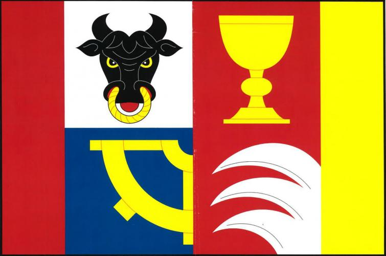 Dvakačovice vlajka